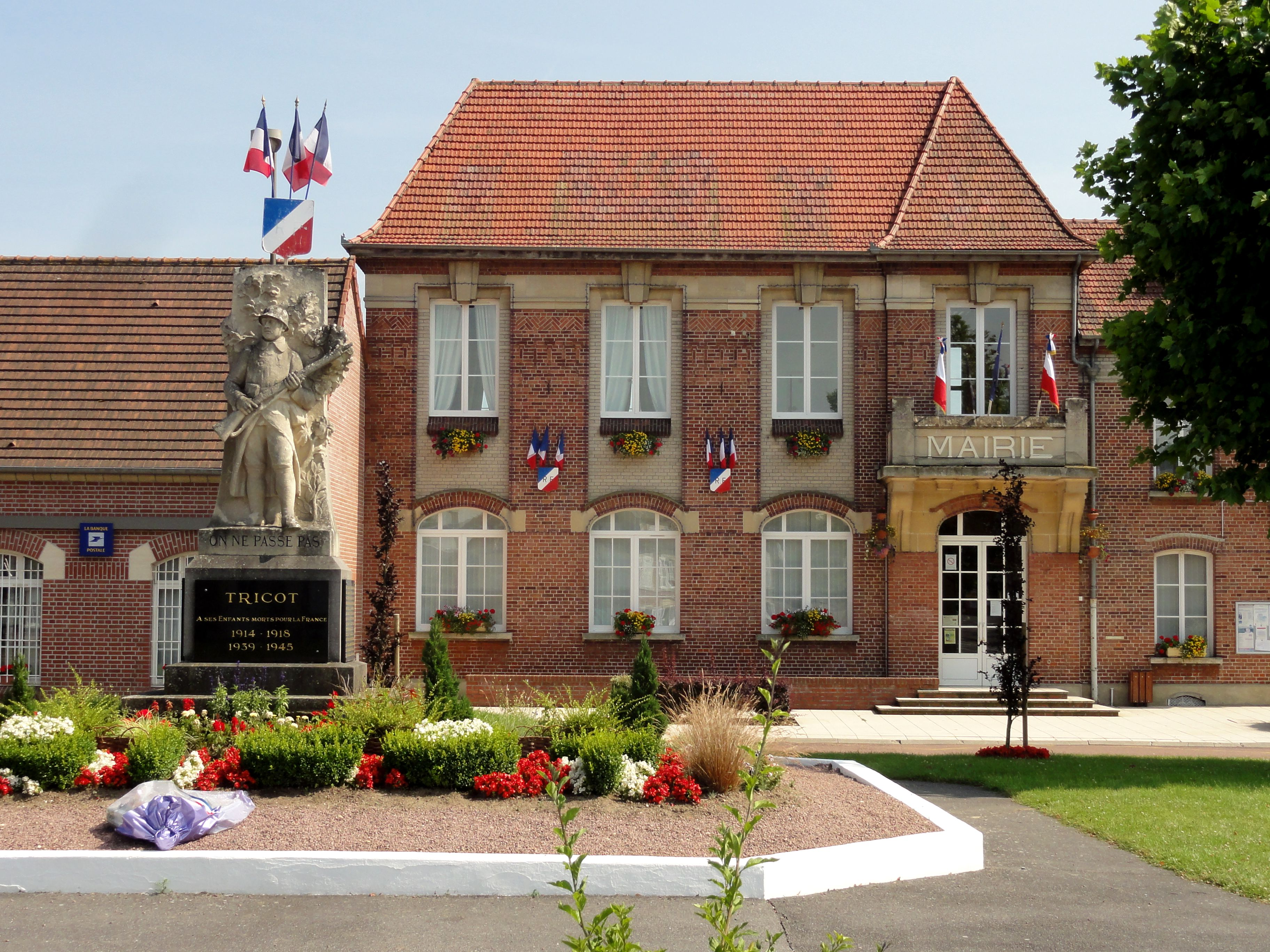 La mairie et le monument aux morts.